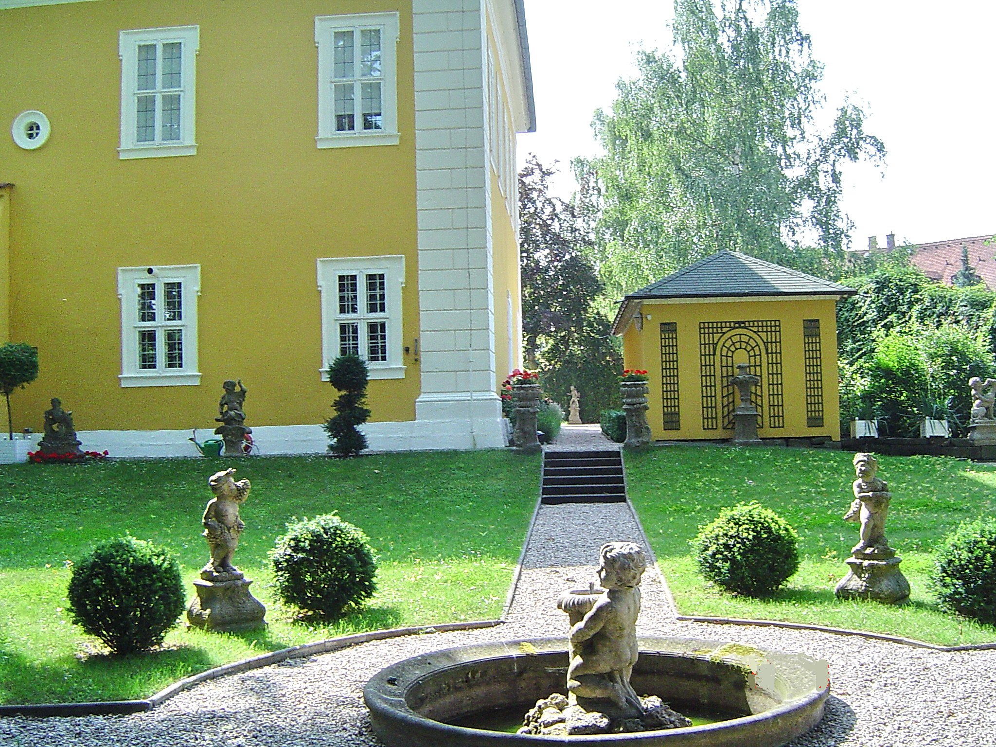 Bayreuth – Schloss Birken (Gartenseite)